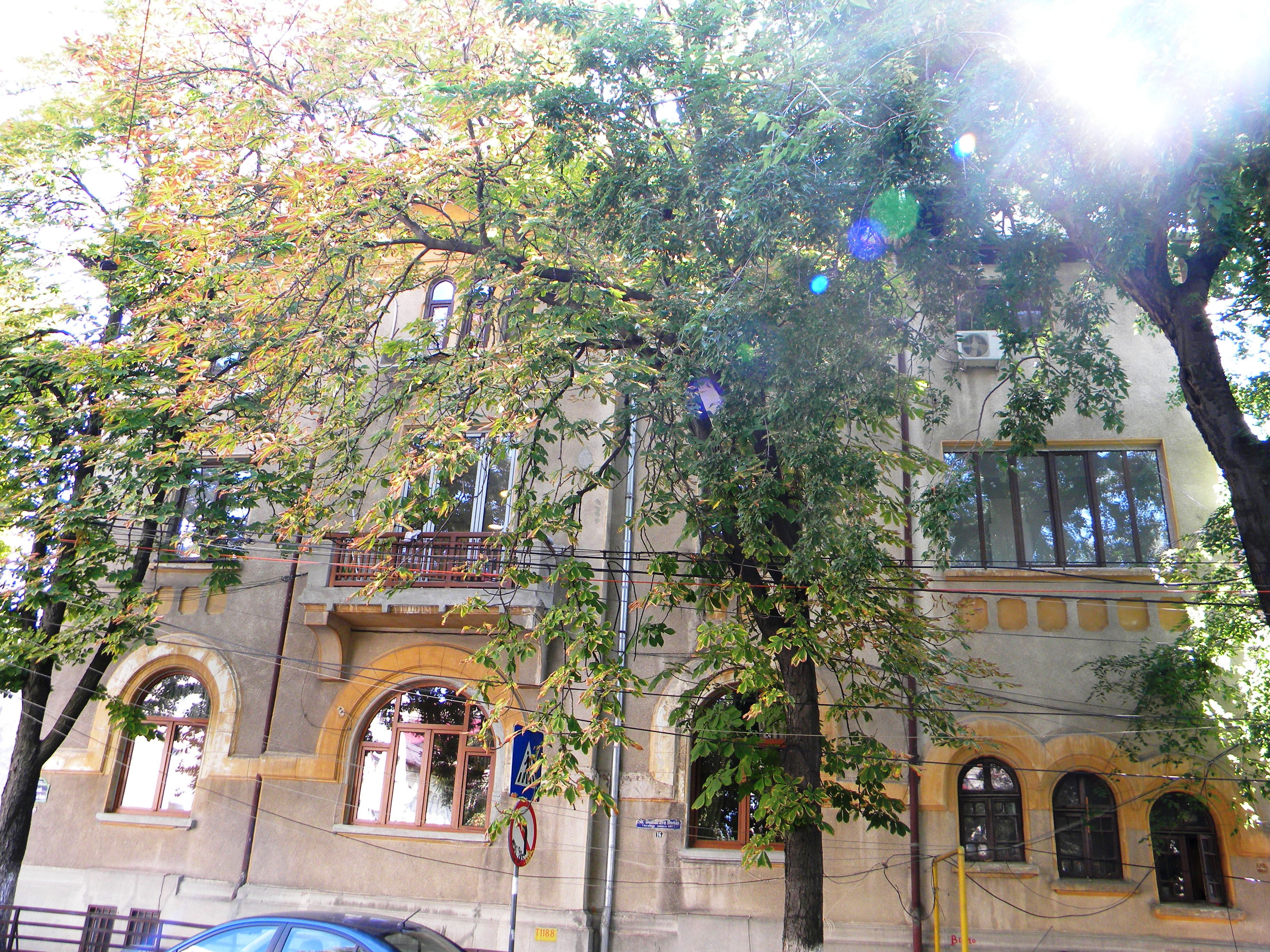 Casa pe Str. Dumbrava Rosie nr. 16, Bucuresti sect. 2